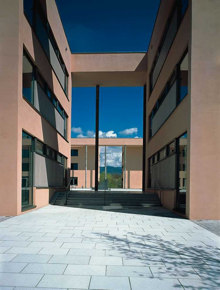 Seitenansicht der Fachhochschule Deggendorf